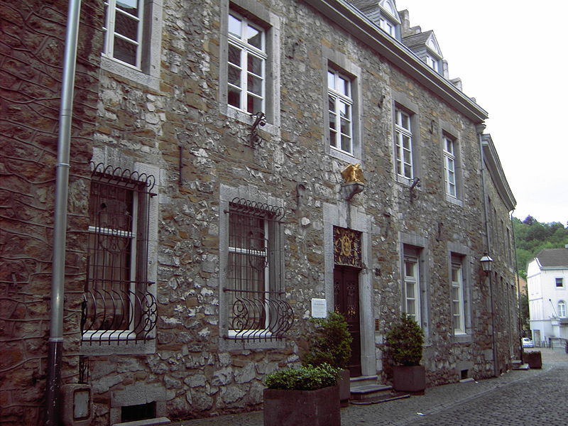 Ehemaliger Kupferhof Schleicher und Adler-Apotheke.